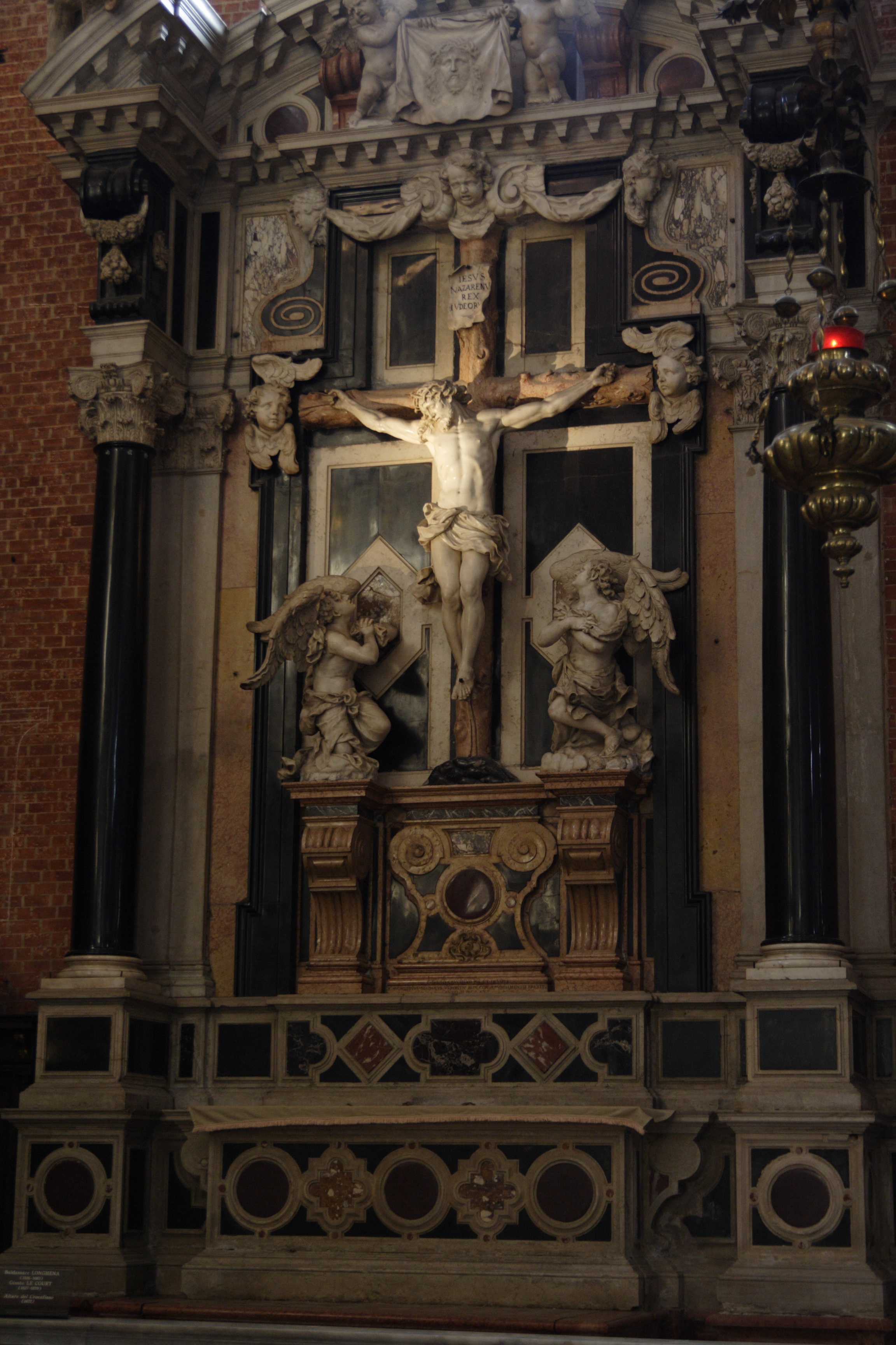 Basilica di Santa Maria Gloriosa dei Frari - The Chapel of the Crucifix